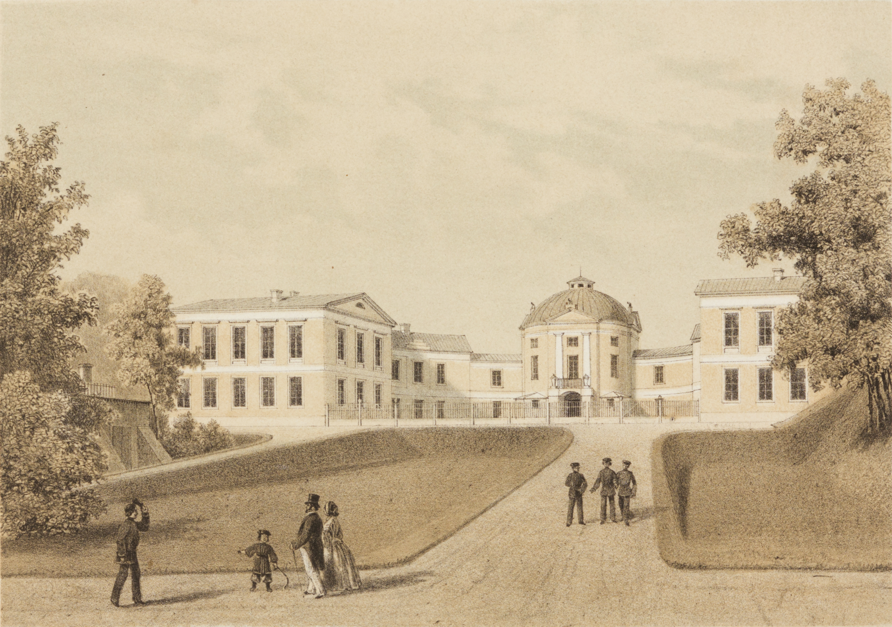 Tartu album. Anatoomikum. MUIS: TKM TR 4038 H 31:15